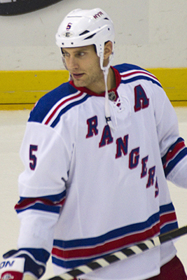 Dan Girardi